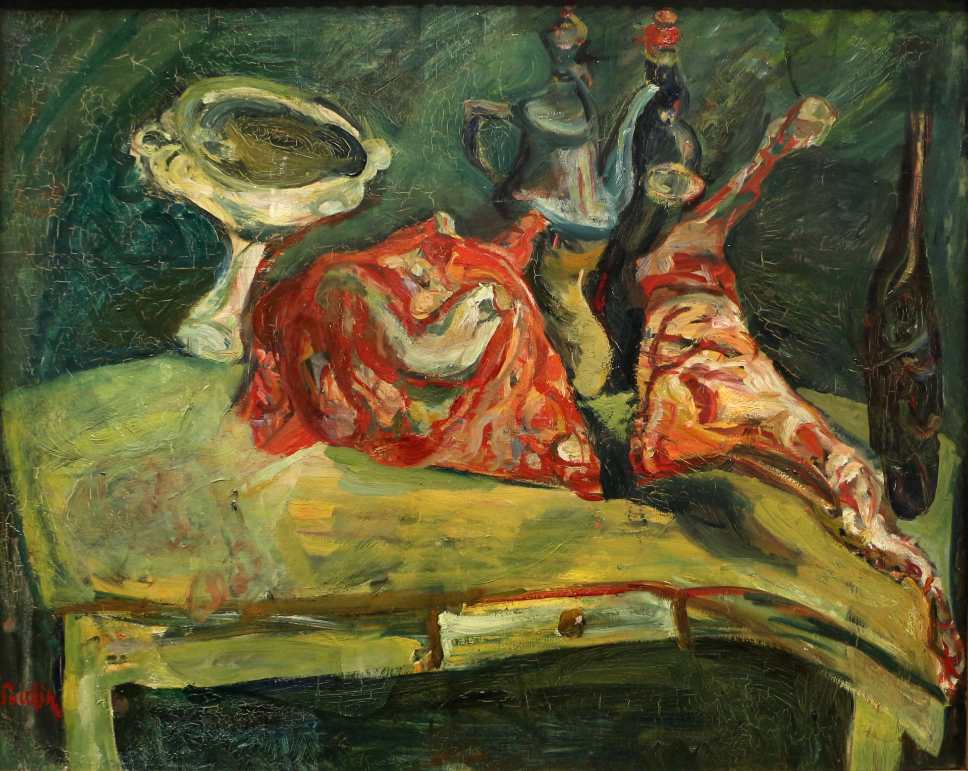 Chaim Soutine, La Table, huile sur toile (81 x 100 cm). Collection Jean Walter et Paul Guillaume, Musée de l'Orangerie.